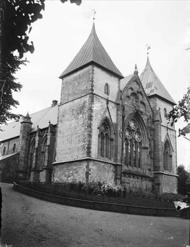 Stavanger domkirke. Avbildet sted: Norge, Stavanger